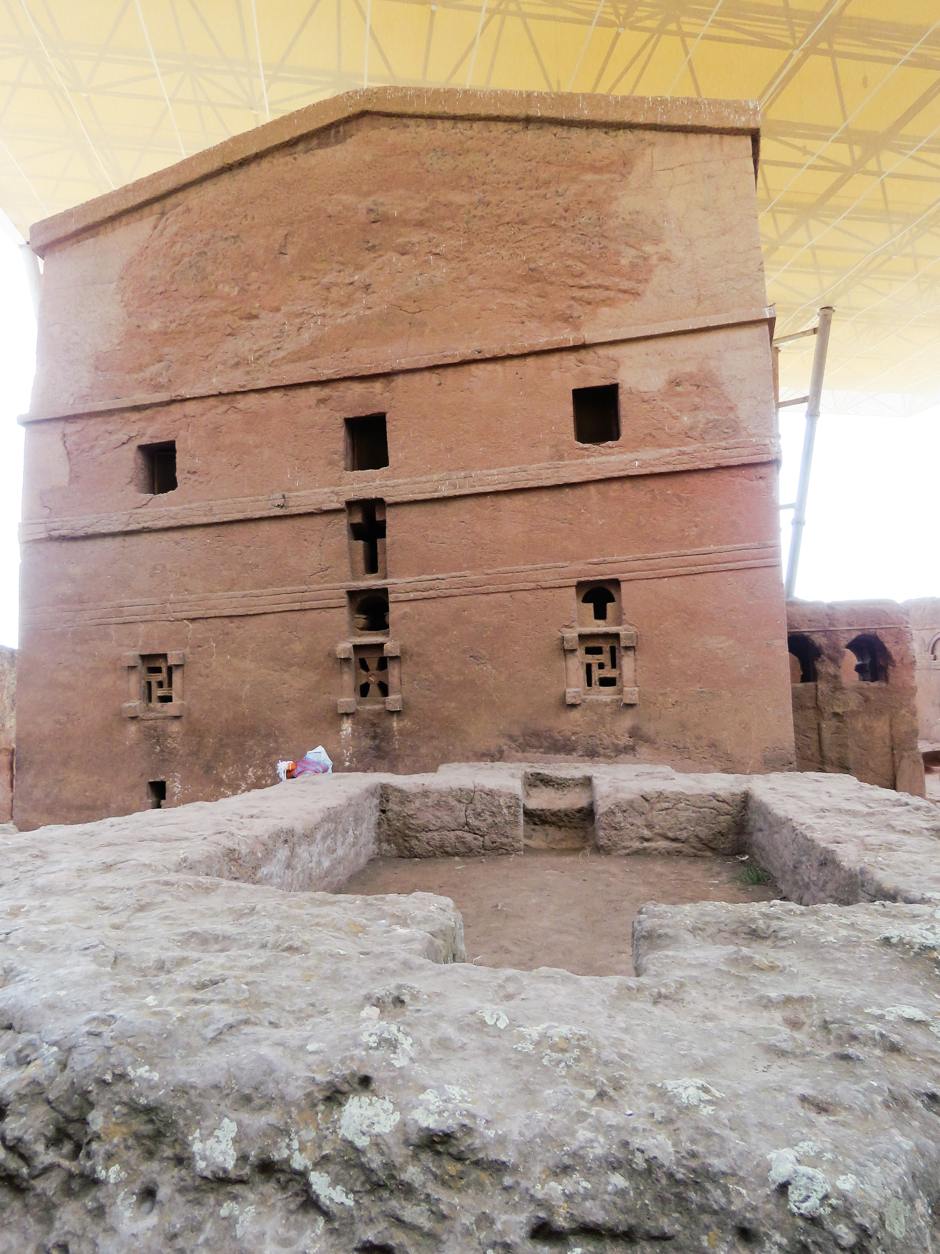 Lalibela Bet Maryam 1